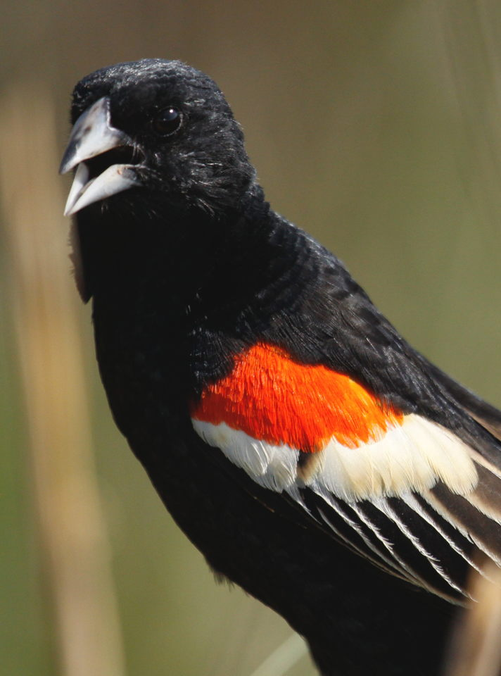 Male